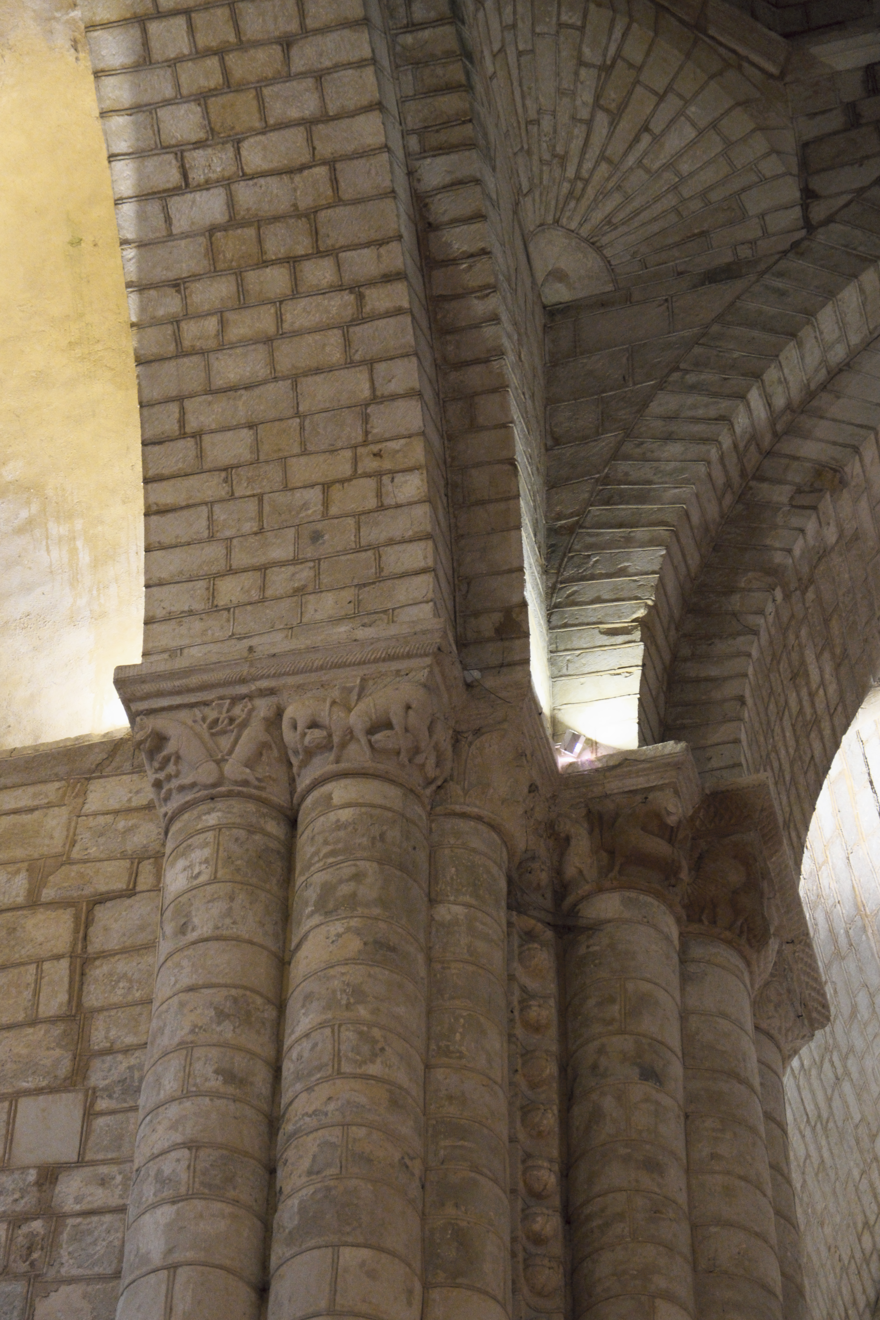 Kirche Notre-Dame-et-Saint-Junien in Lusignan im Département Vienne (Nouvelle-Aquitaine/Frankreich), Kapitelle